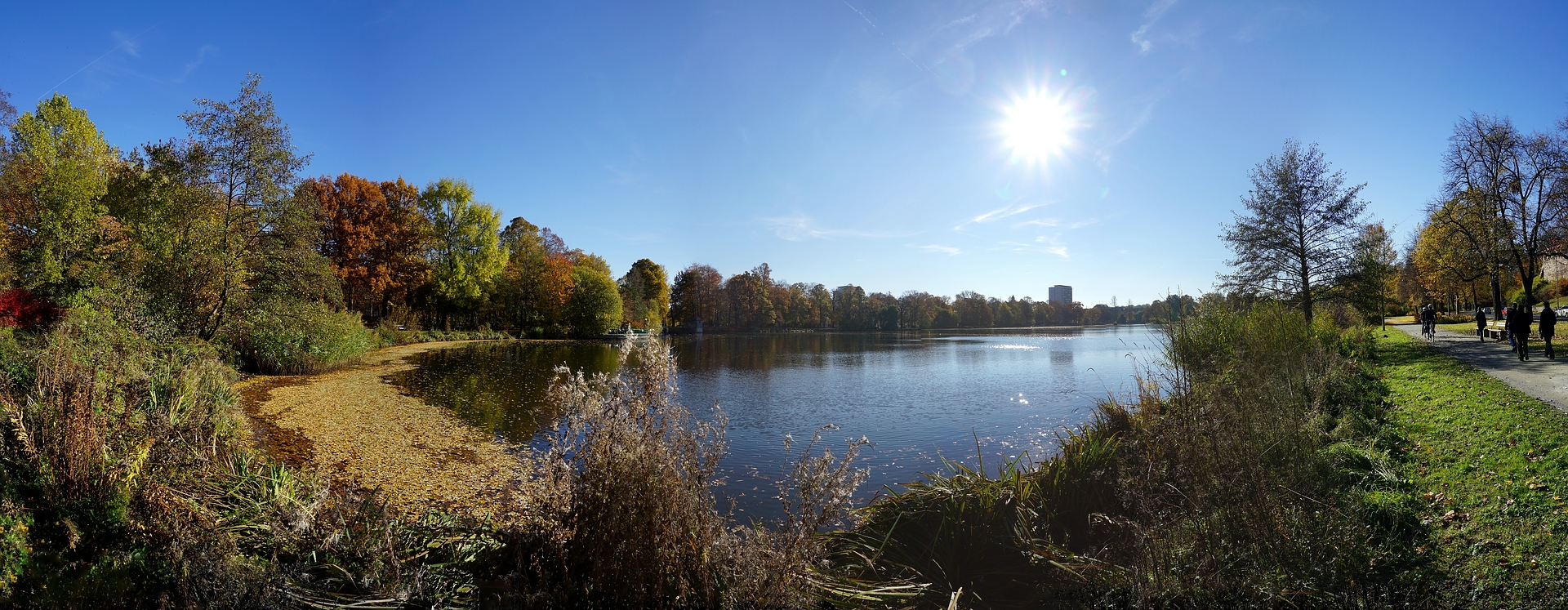 Der Schlosteich und die Parkanlagen am Schlossteich